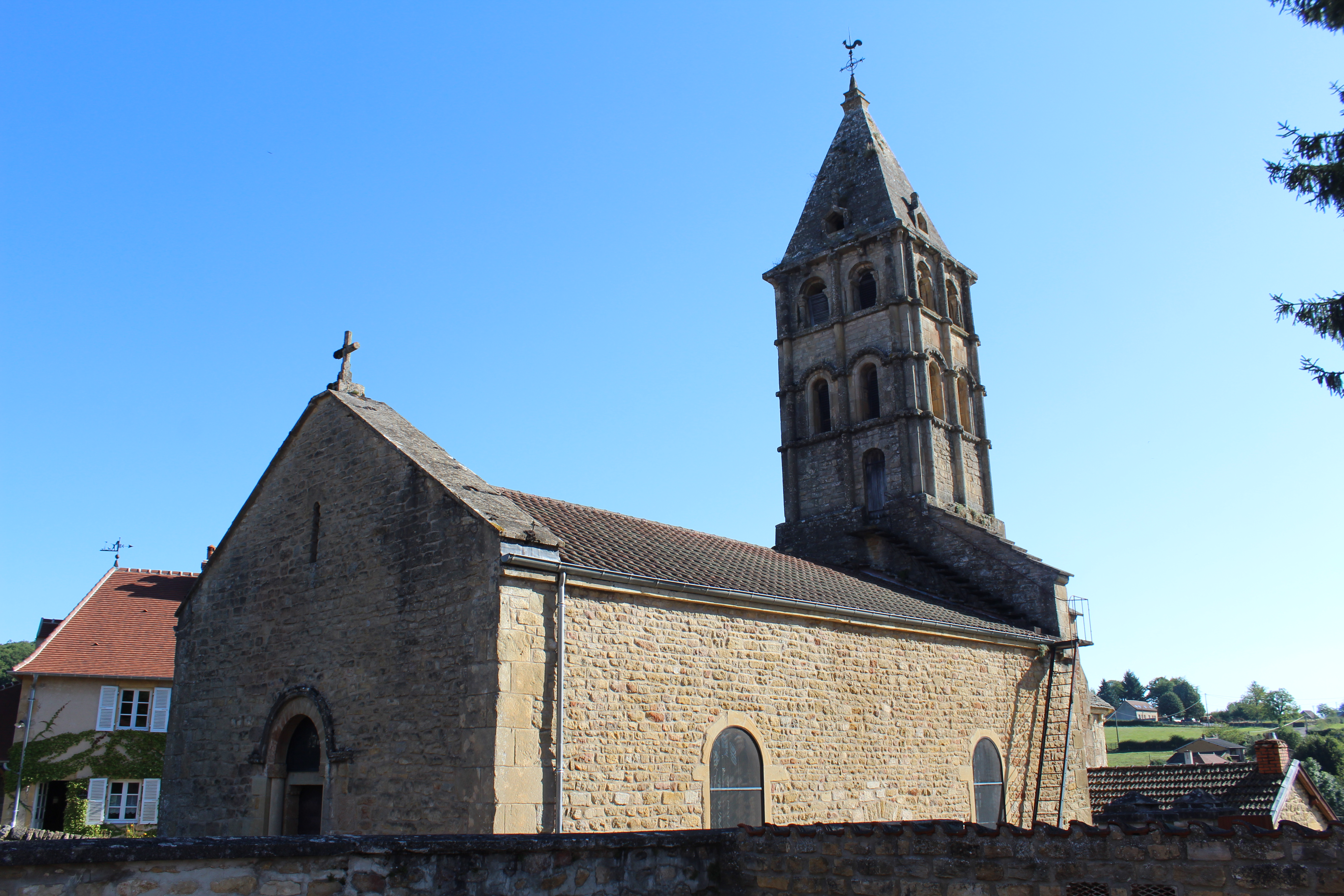 Église Saint-Martin de Vareilles, Saône-et-Loire.